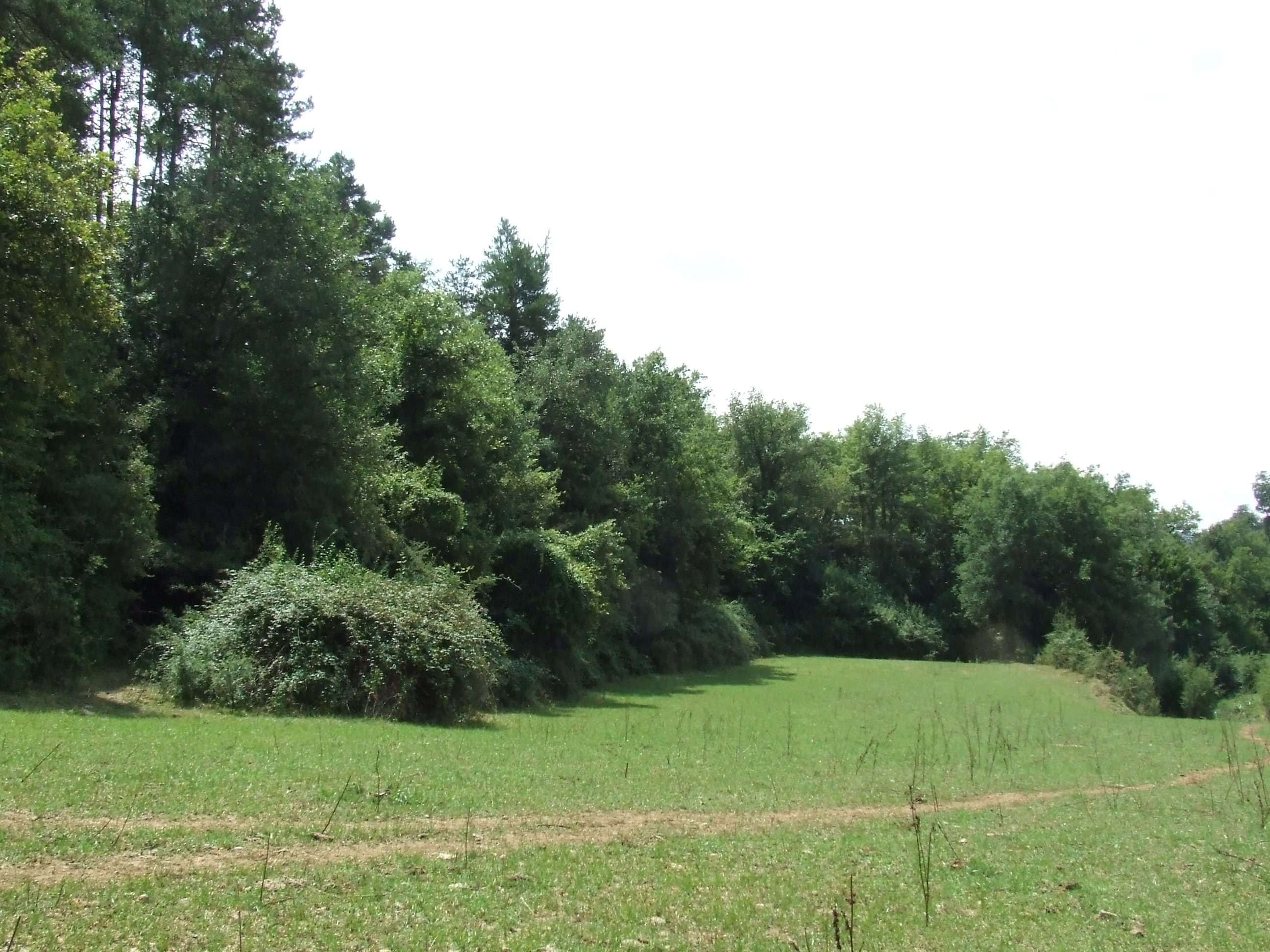 El Pou d'Esplugues (Castellcir, Moianès)